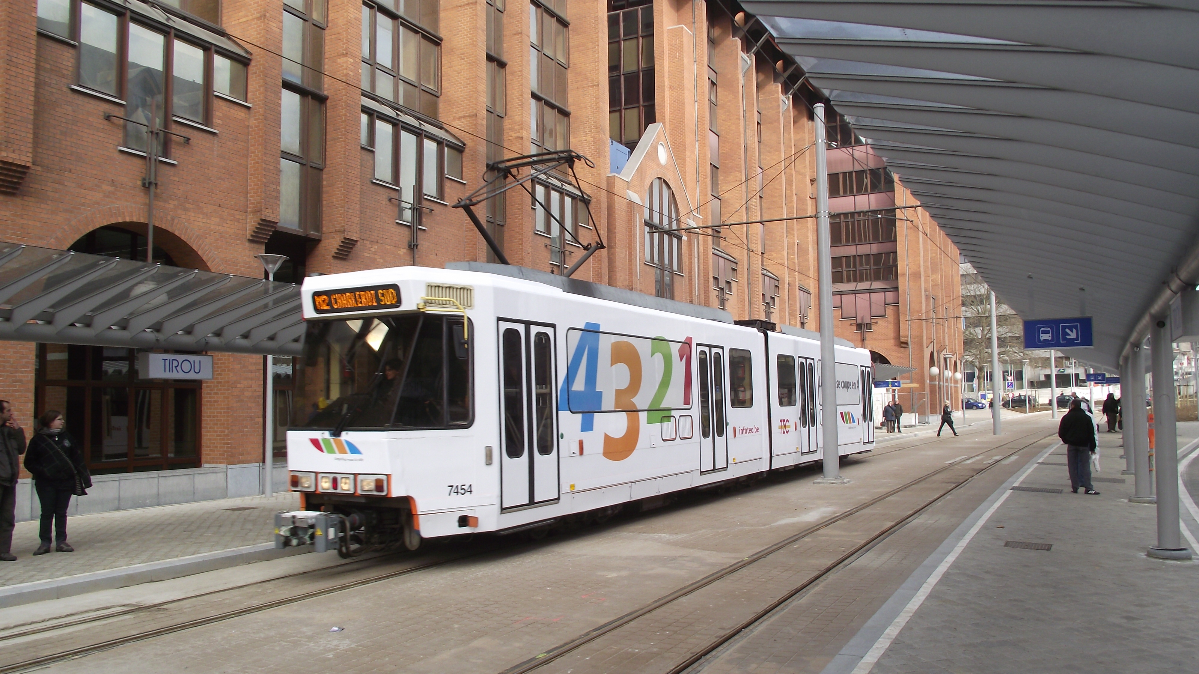 De M2 tram op de ringlijn bij de halte Tirou in de tegenwijzerzin. De tram is met folie beplakt om de nieuwe lijnnummers aan te kondigen.